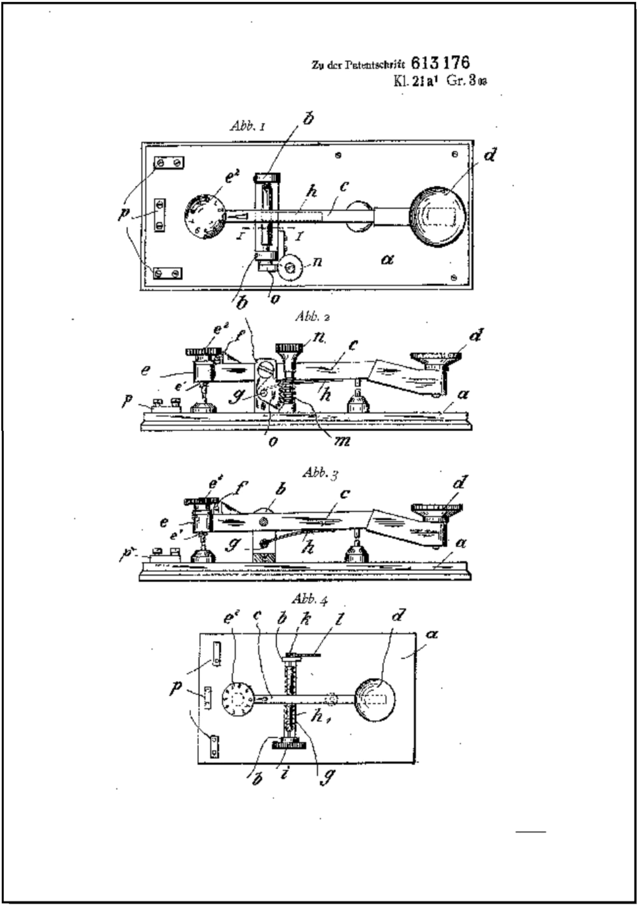 Anlage zum Patent Nr. 613176 für Kap. J. Junker für die von ihm erfundene Ausführung einer Morsetaste.